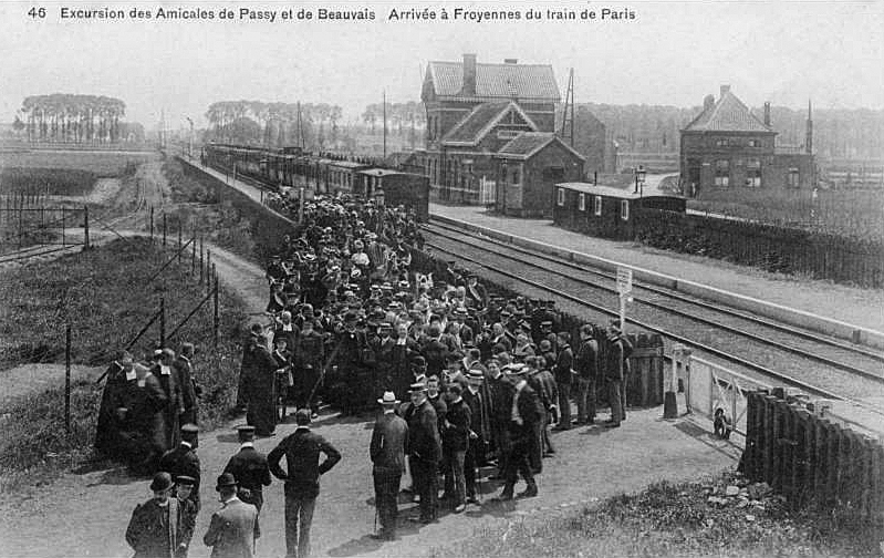 La gare de Froyennes lors de l'arrivée du train de Paris, d'où débarquent une excursion des amicales de Passy et de Beauvais.